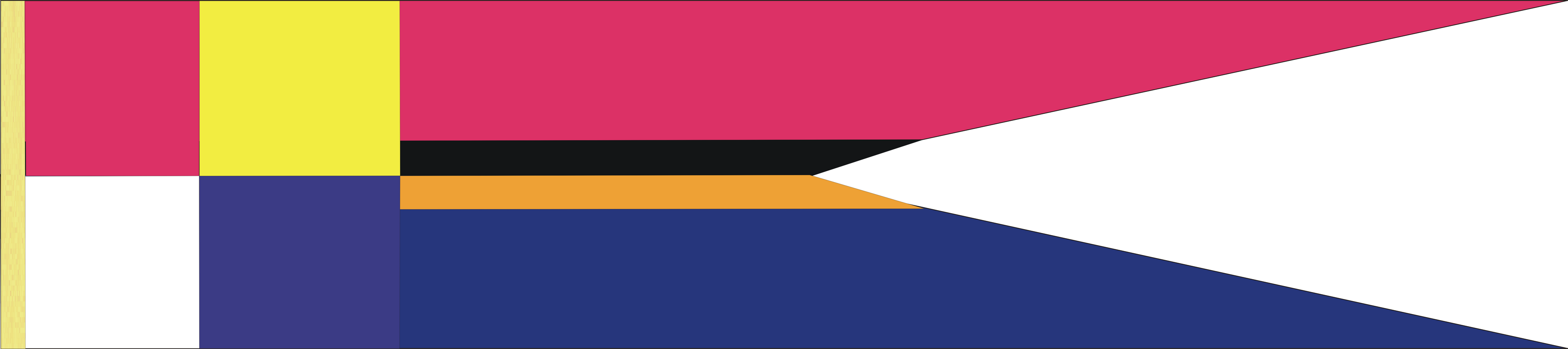 Proporczyk dowódcy 7 Pułku Pancernego (PSZ)